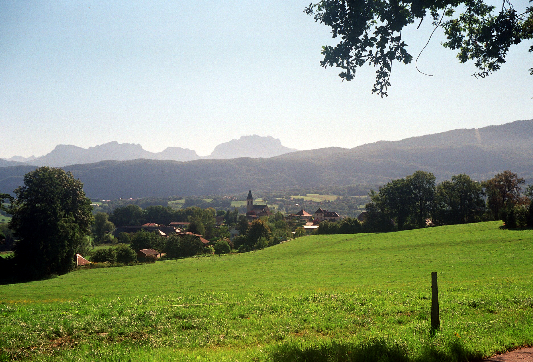 Montagny vu de la route d'Oilly, août 2010. En arrière plan : la Tournette et les dents de Lanfon et tout au fond, à gauche, les Aravis.